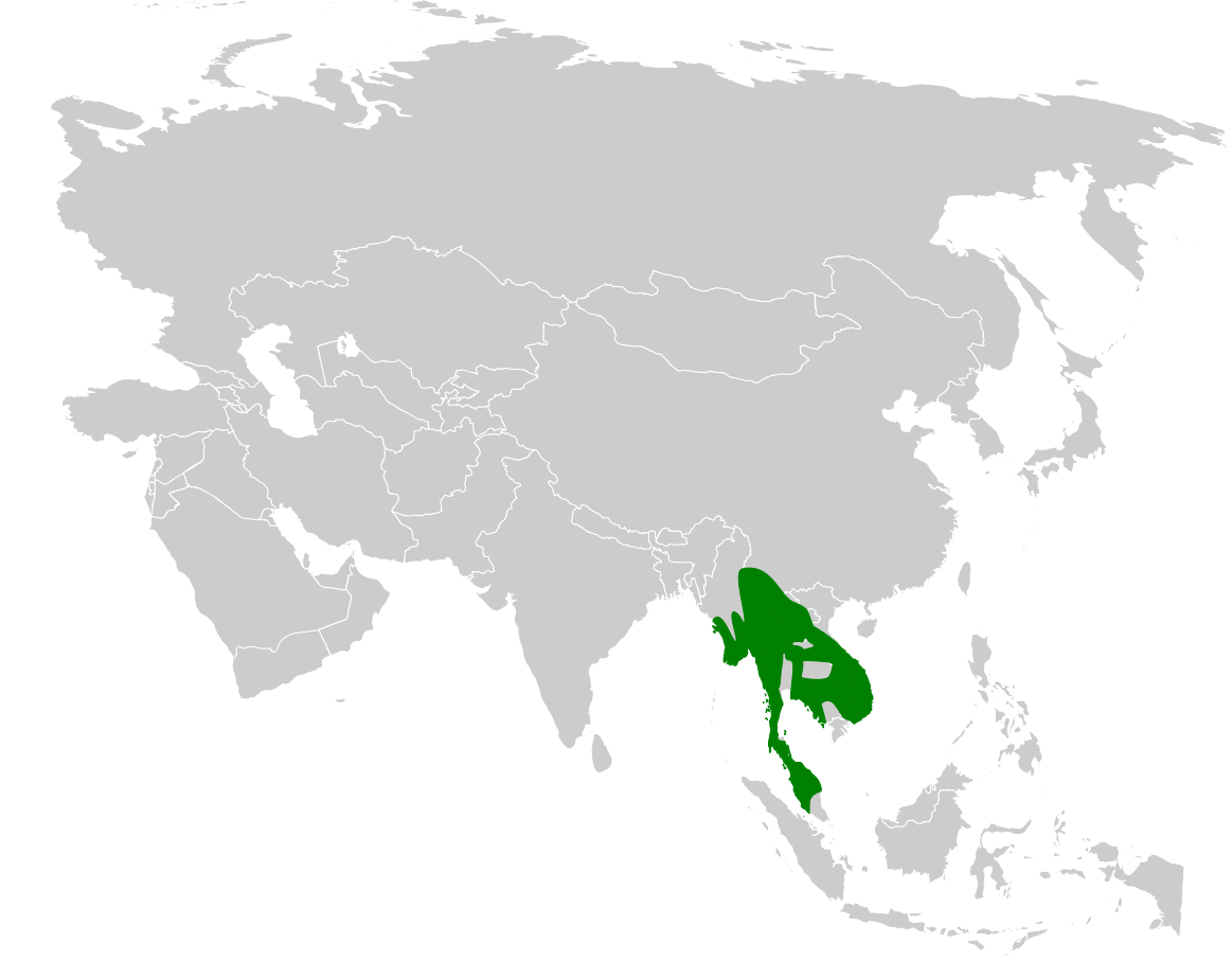 Pycnonotus finlaysoni distribution map, based on